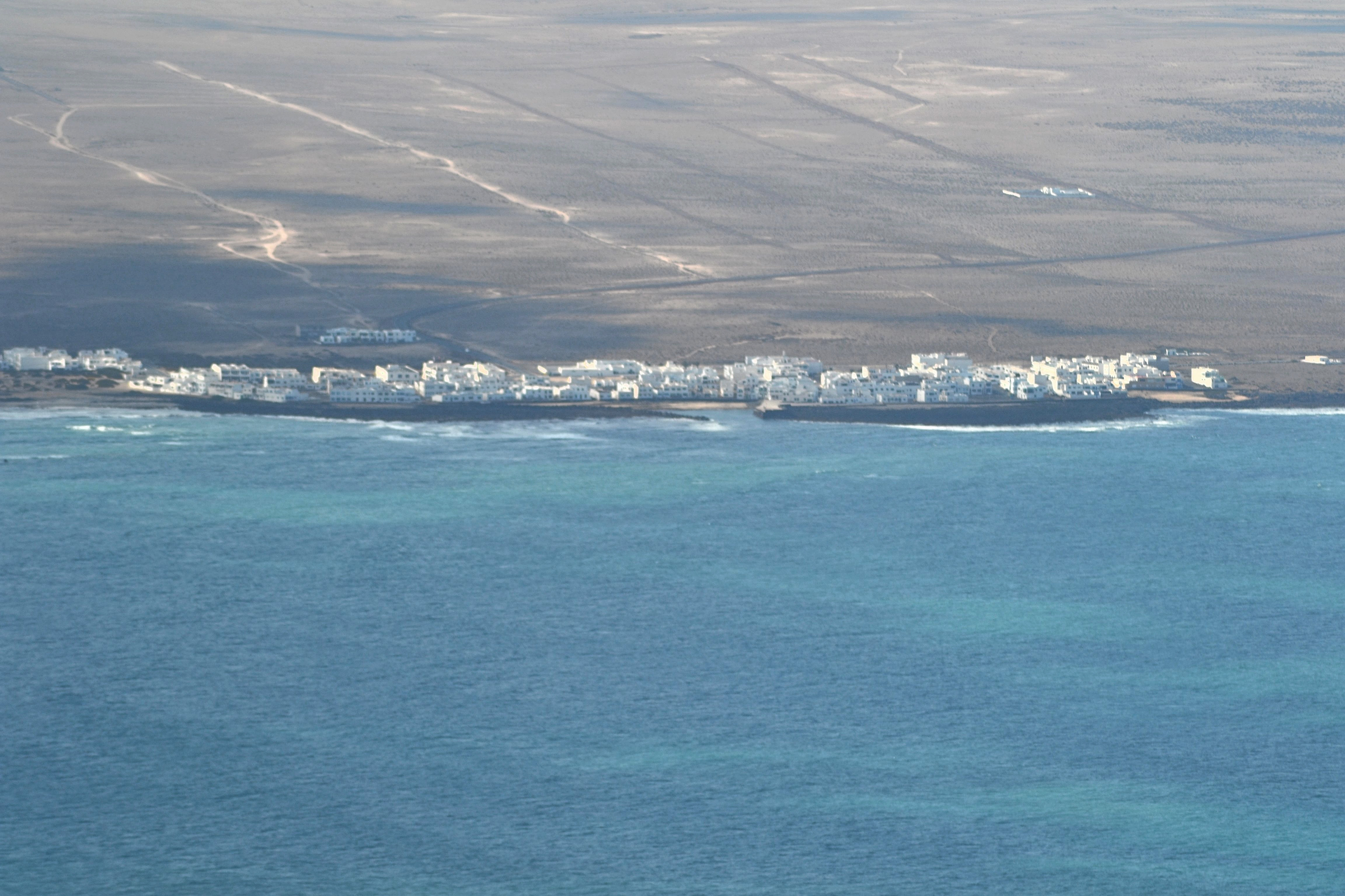 Der Ort Caleta de Famara an der Nordwestküste der Kanarischen Insel Lanzarote; vom Bergmassiv Risco de Famara gesehen